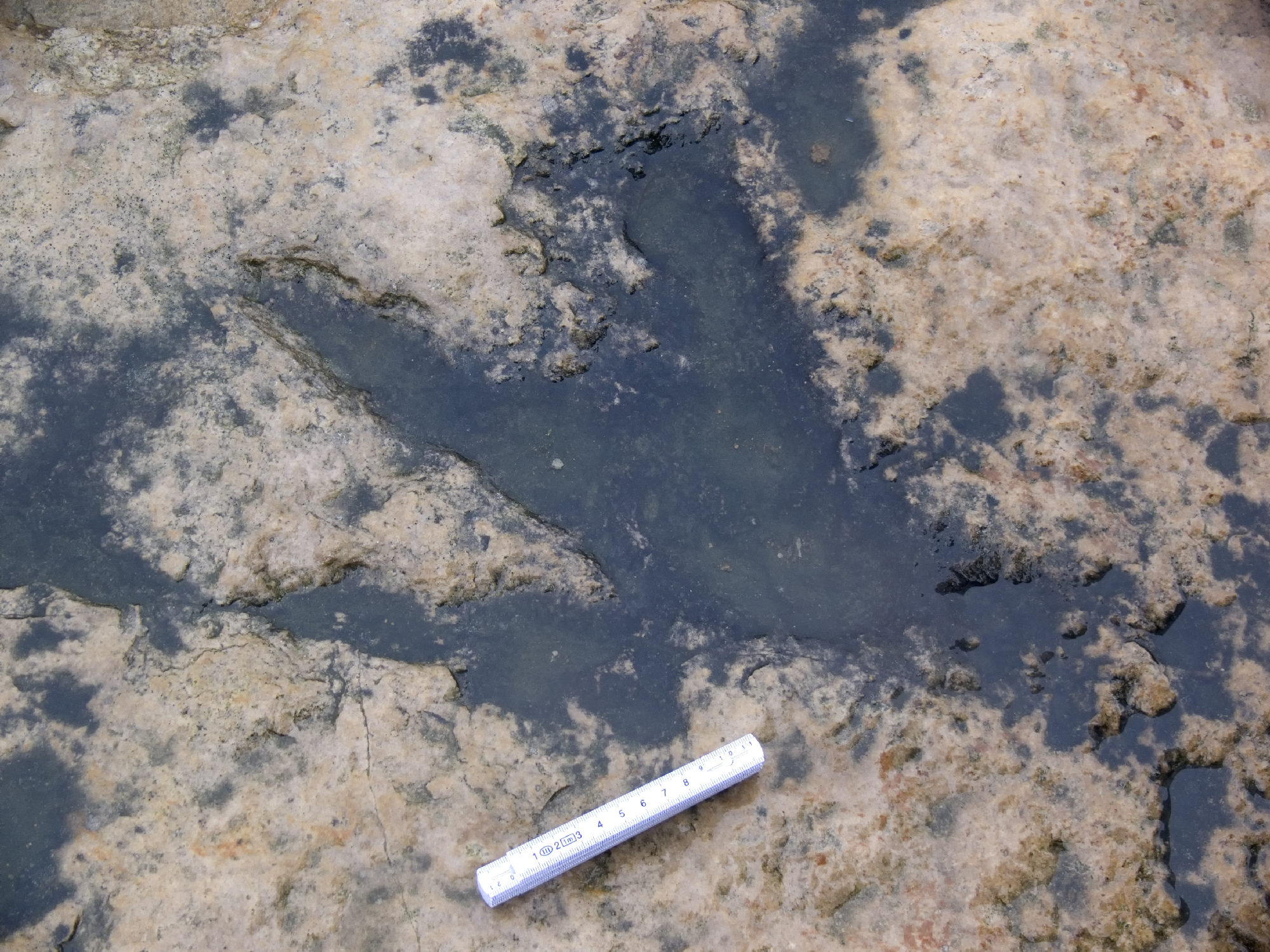 Obernkirchen - Dinospur